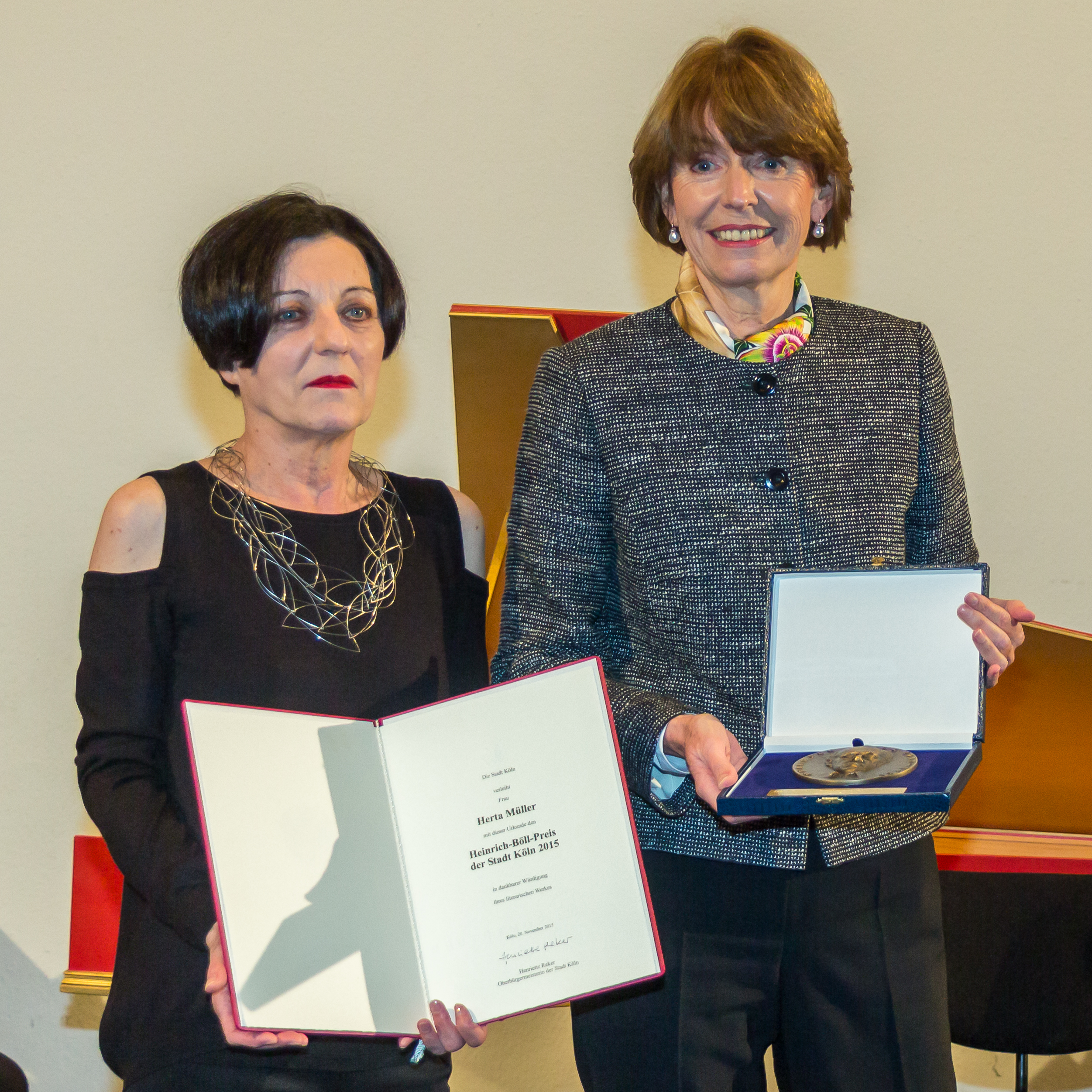 Verleihung des Heinrich-Böll-Preises an die Literaturnobelpreisträgerin Herta Müller durch Kölns Oberbürgermeisterin Henriette Reker in der Piazetta des Historischen Rathauses in Köln